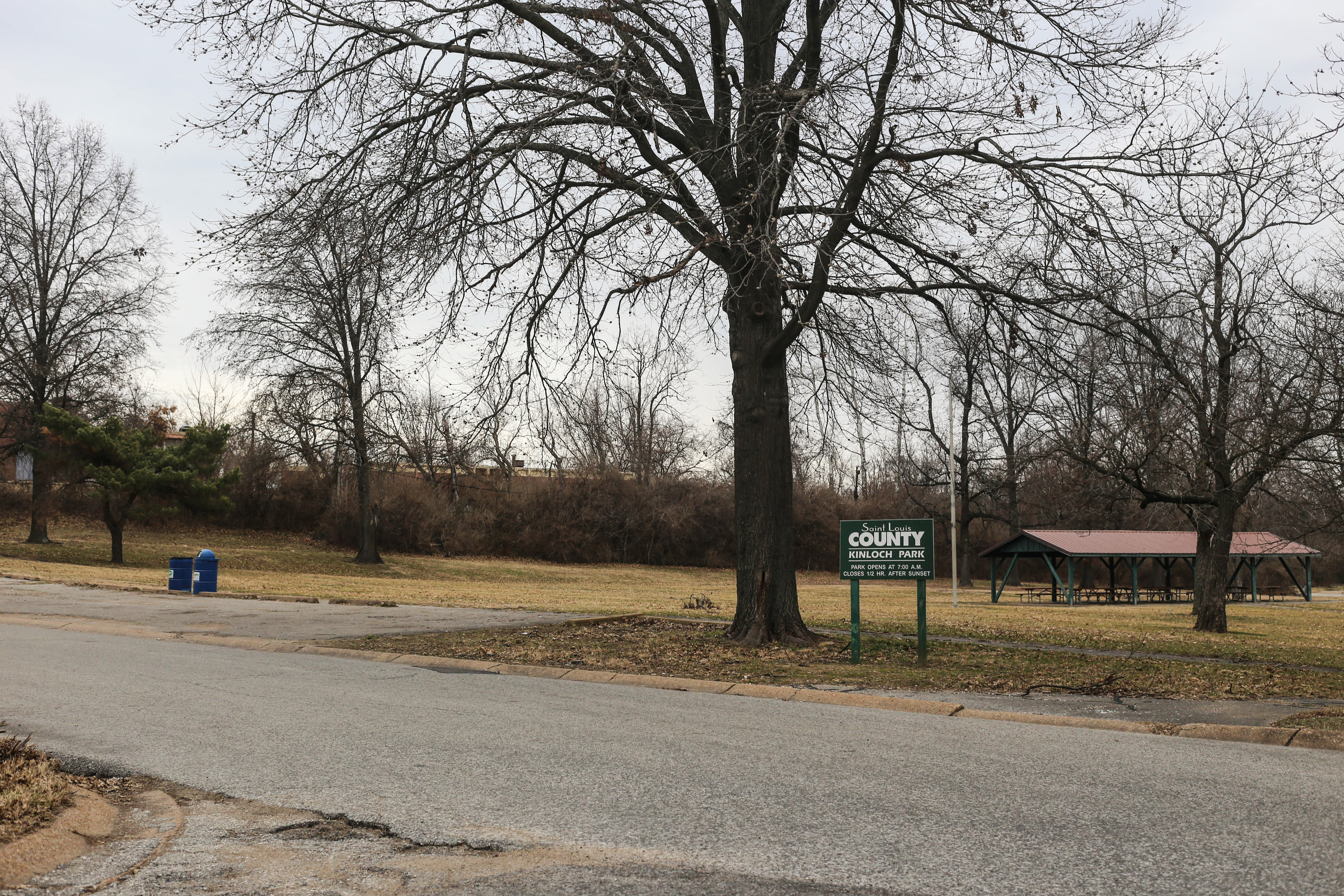 Kinloch Park